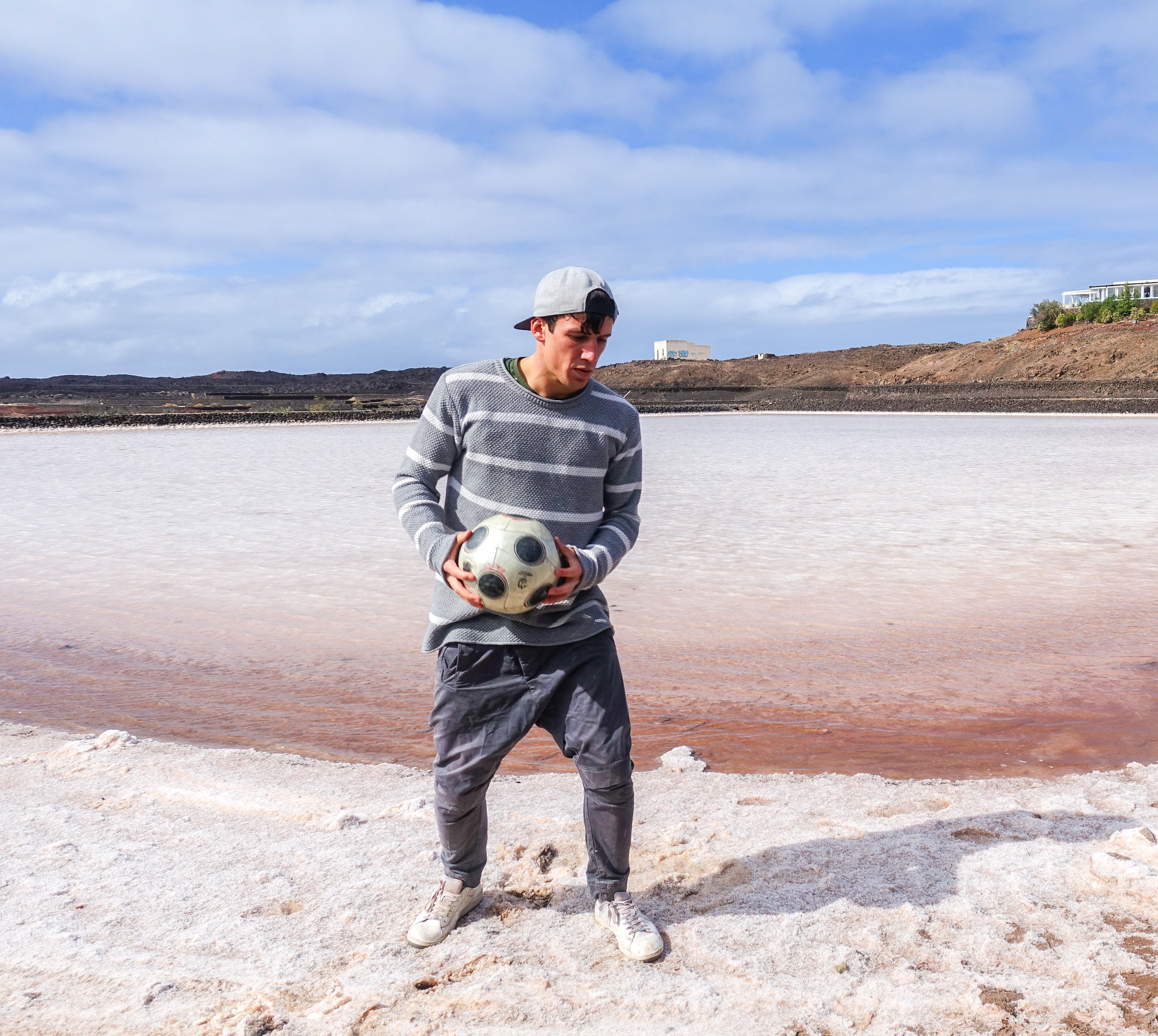 Gunther Celli il una sua foto con palla da calcio freestyle